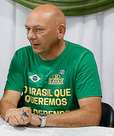 (Camboriú - SC, 02/05/2019) Presidente da República, Jair Bolsonaro durante transmissão de Live para redes sociais.